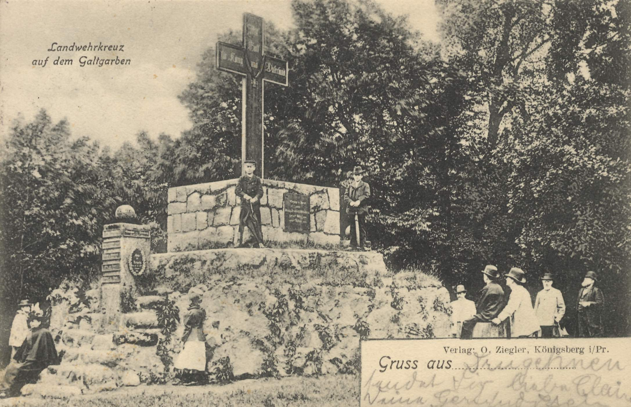 Landwehrkreuz auf dem Galtgarben